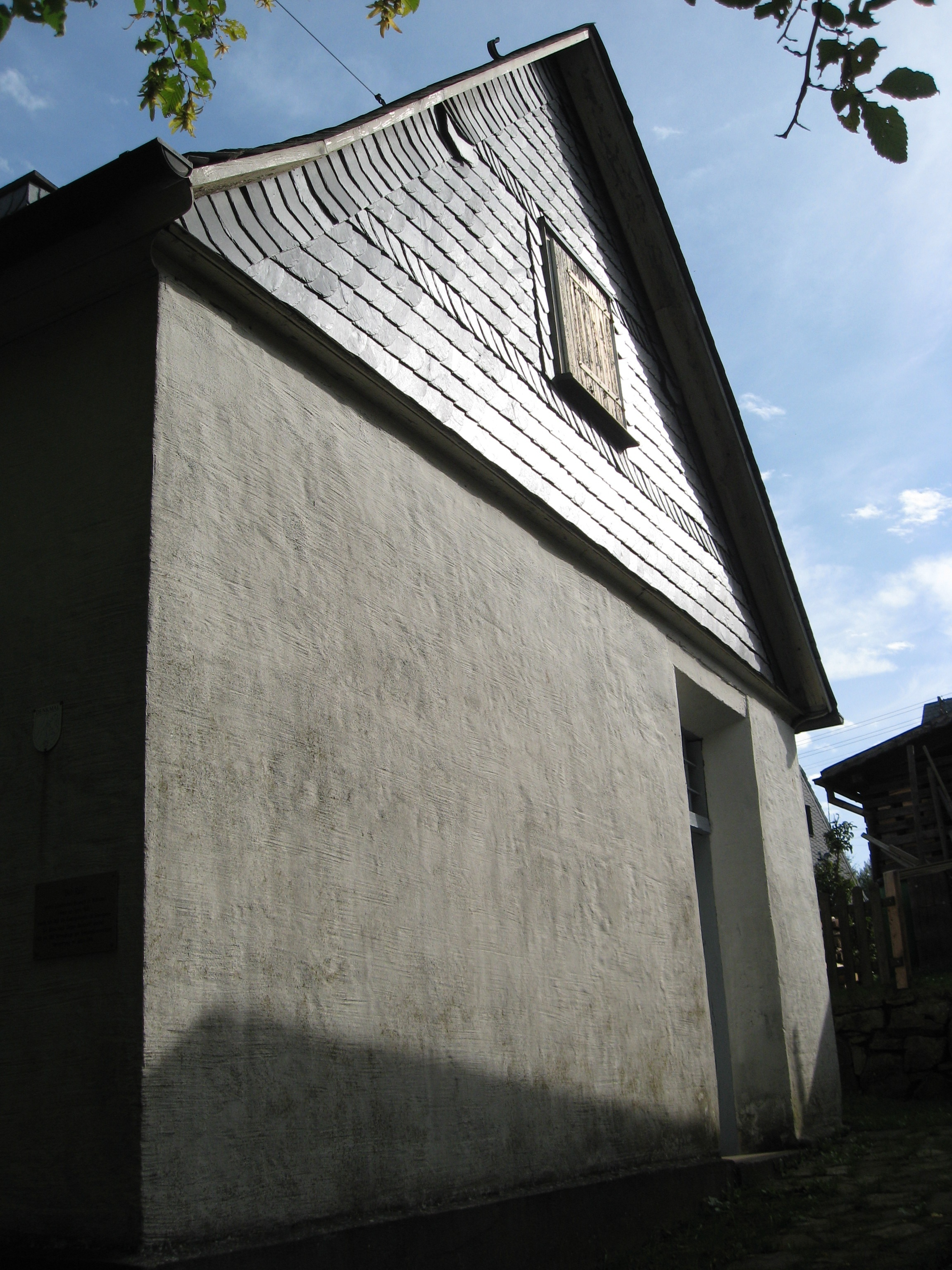 Das Arrestgebäude in Wilnsdorf im Siegerland, bis 1958 genutzt.